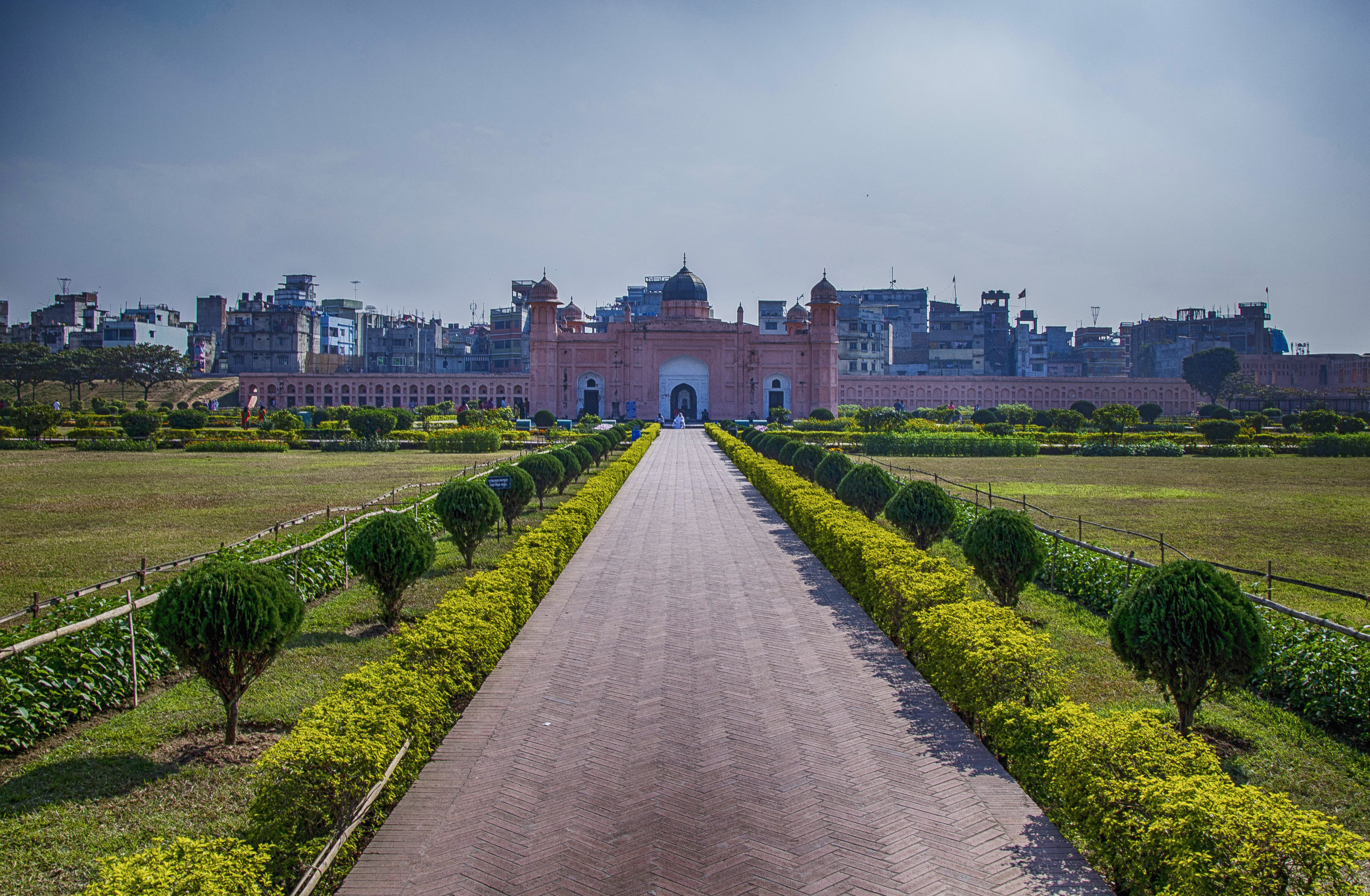 লালবাগ দুর্গ